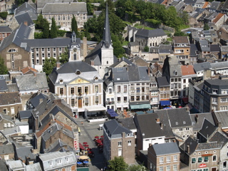 Grand'Place de Huy vue du Fort